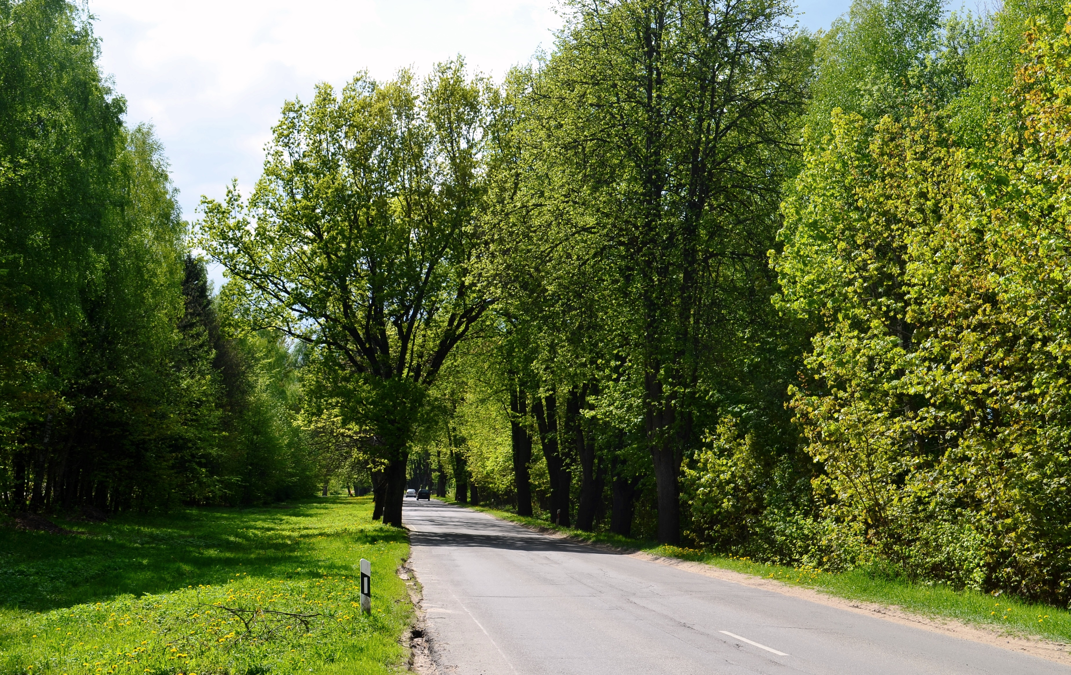 Alėja aplink Džiaugsmo gatvę, Strielčiukai, Vilnius